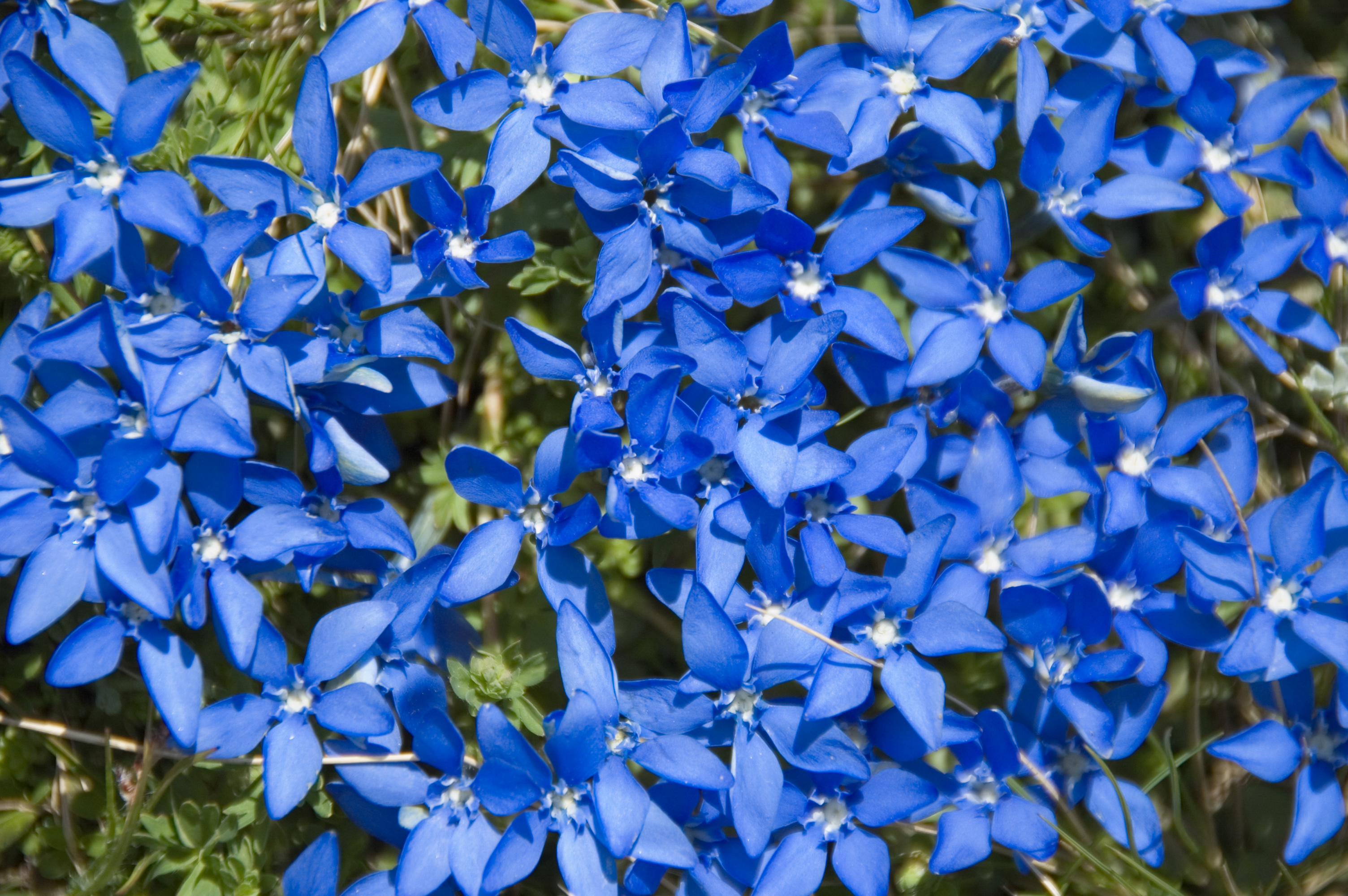 spring gentian Gentiana verna